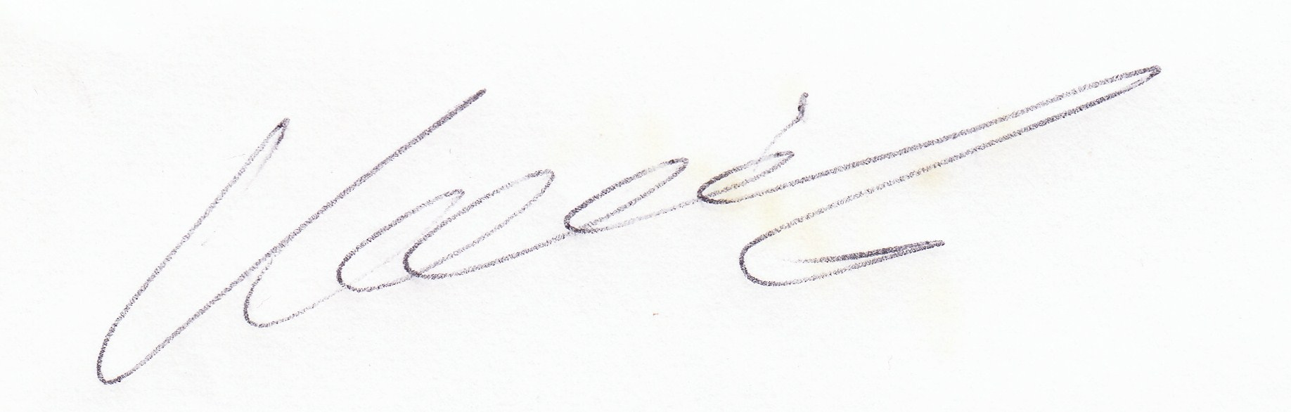 Autogramm des ehem. Bundesliga-Spielers von 1978